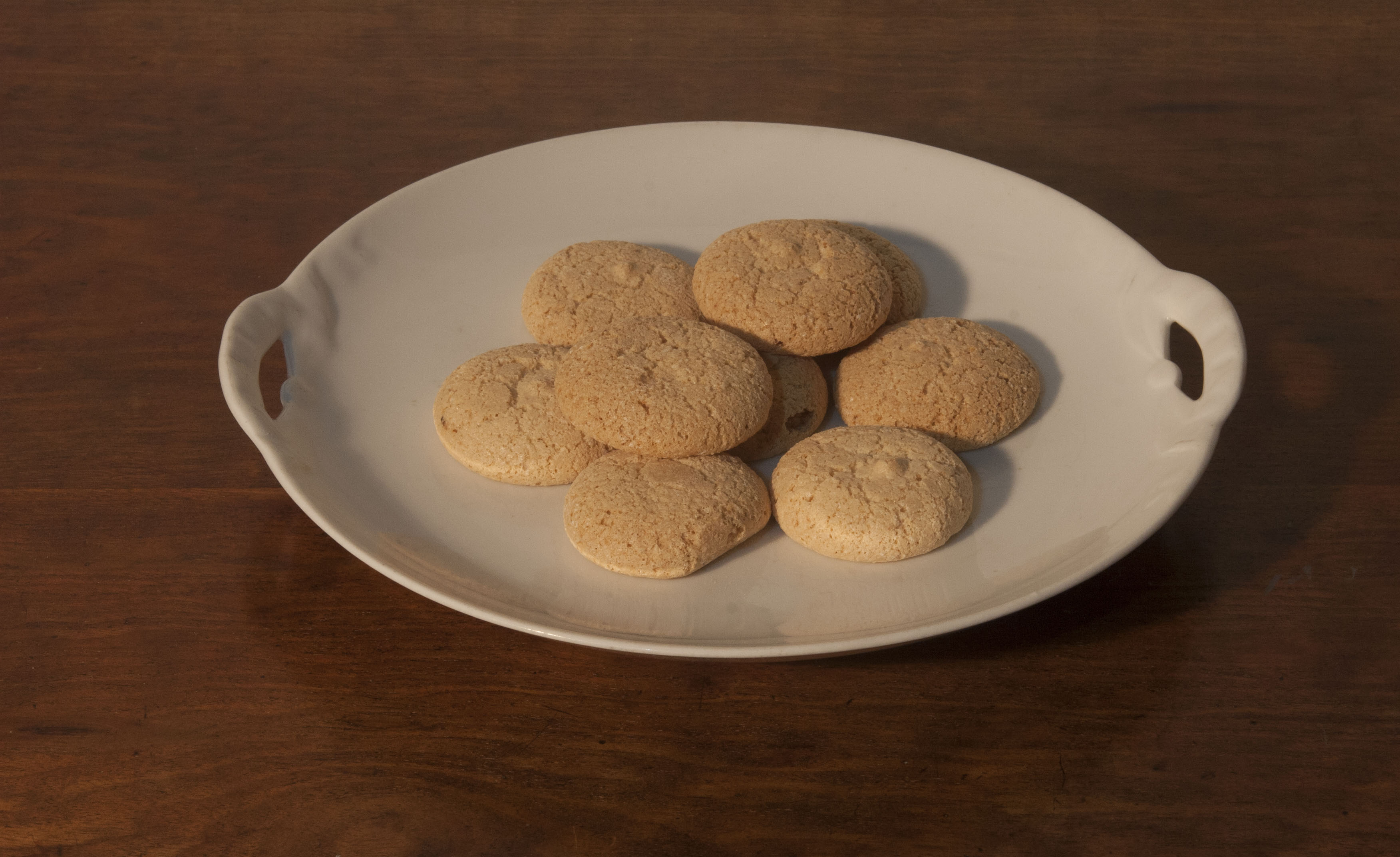 Makroner serveret på et fad